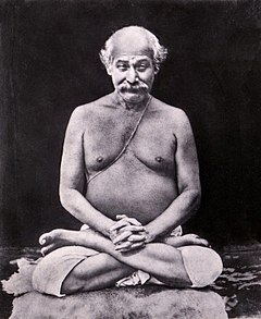 नेपाली: लाहिडी महासय को पद्मासन मा बसेको फोटो , उहाँ को यहि एकमात्रै फोटो हो